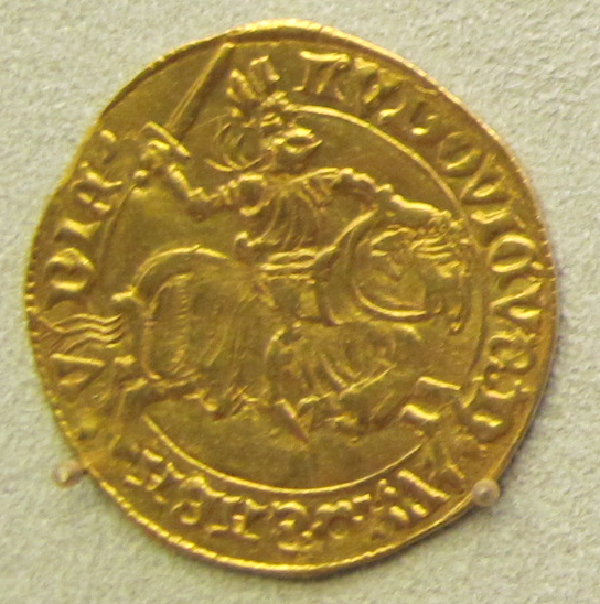 Savoia, luigi, ducato 1434-1465